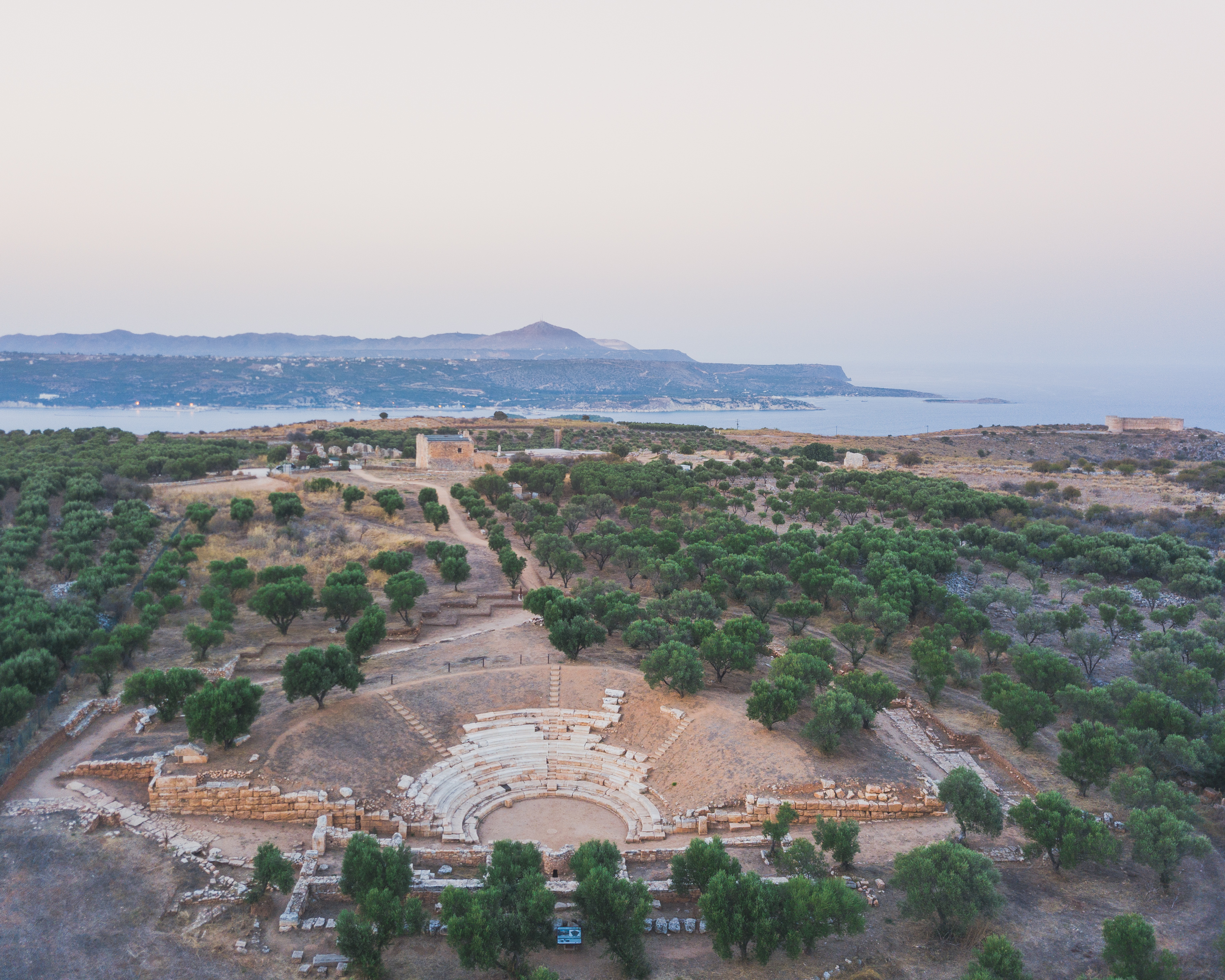 Θέατρο Αρχαία Άπτερα«Άπτερα»